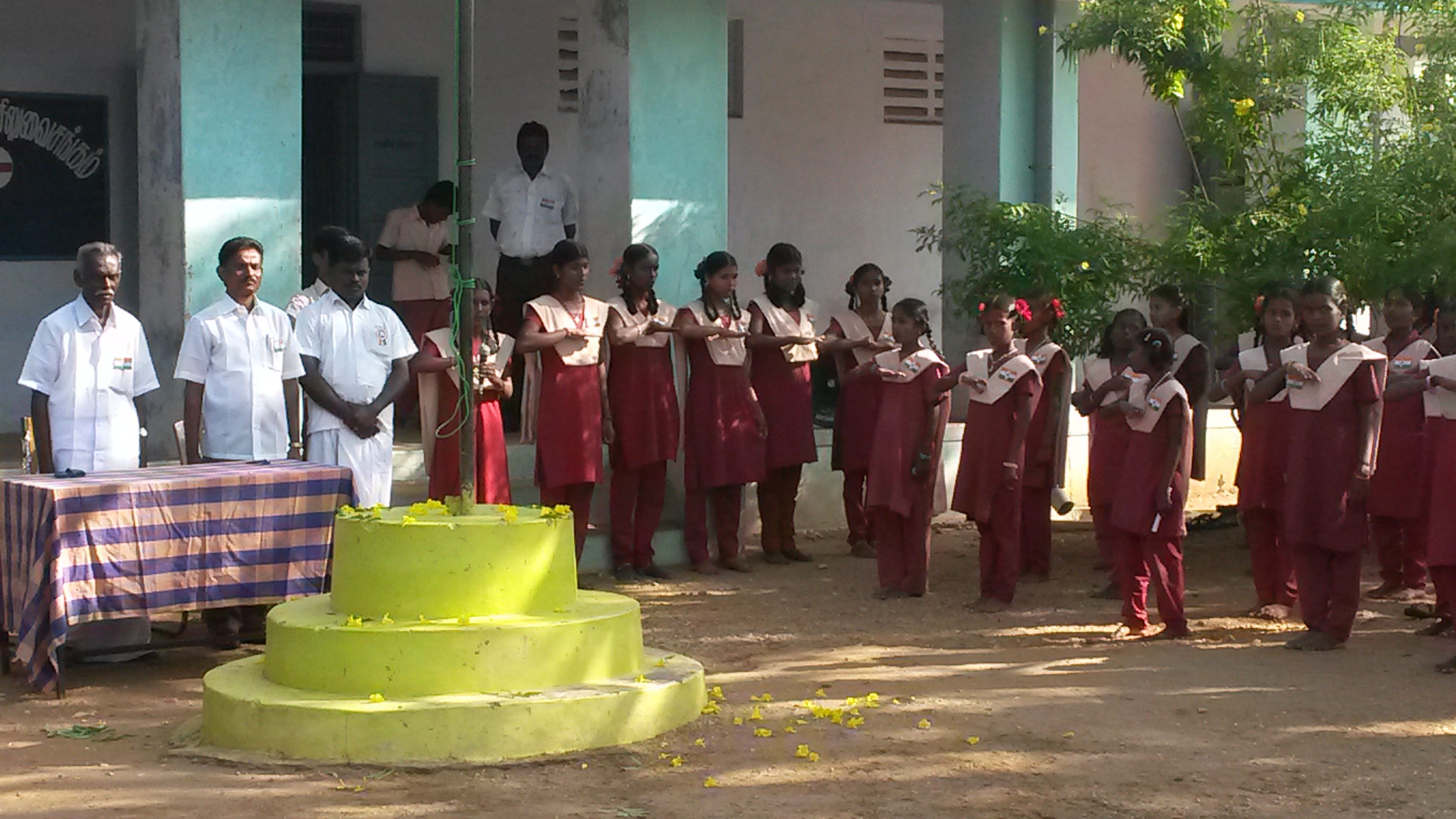 குடியரசு தின விழாவில் கொண்டாட்டத்தின் போது